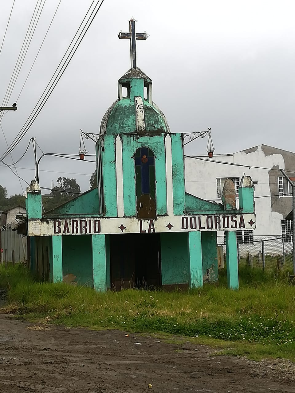 Iglesia de el Barrio La Dolorosa